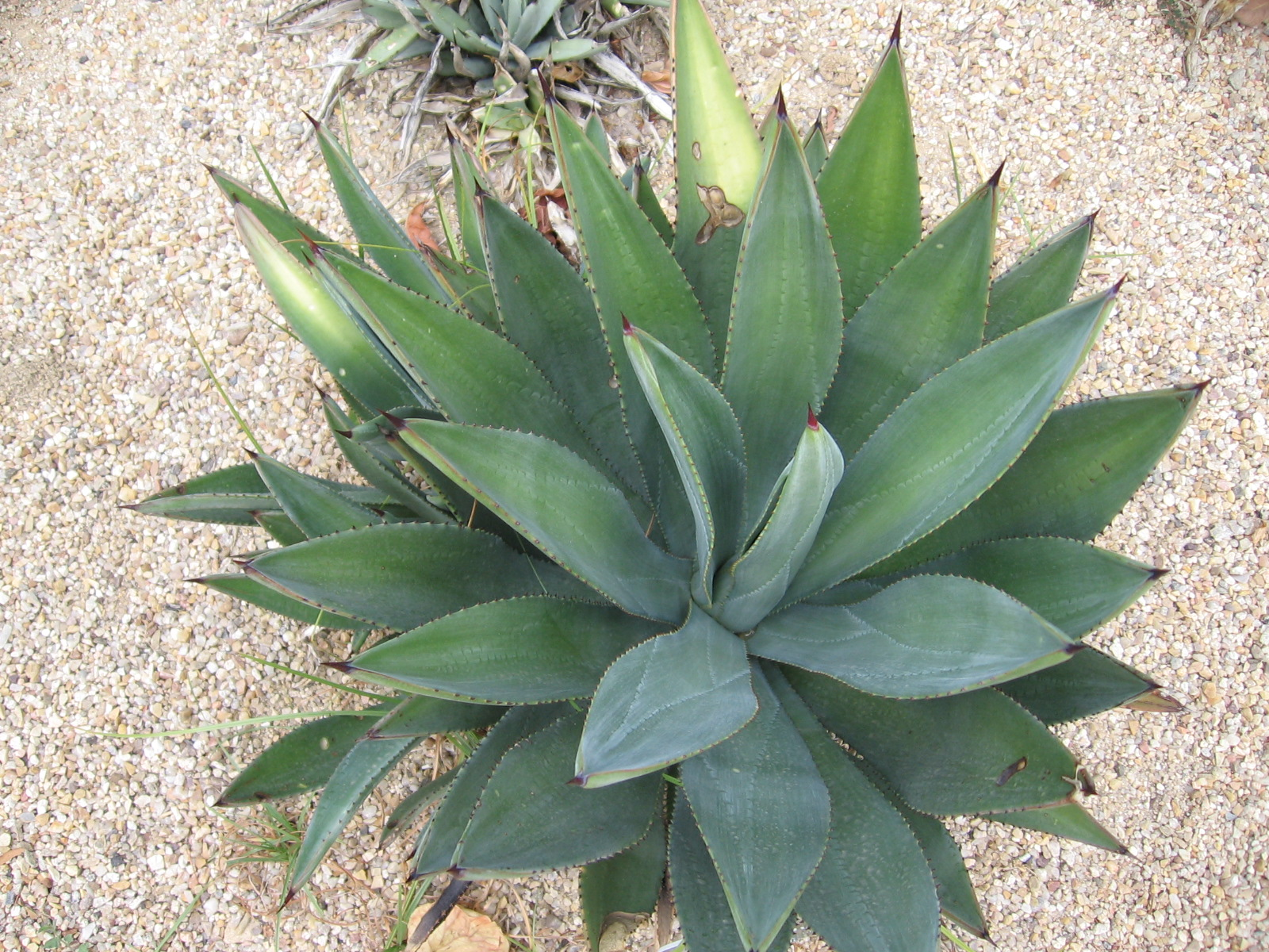 Agave murpheyi. Foto tomada en el Real Jardín Botánico de Madrid.